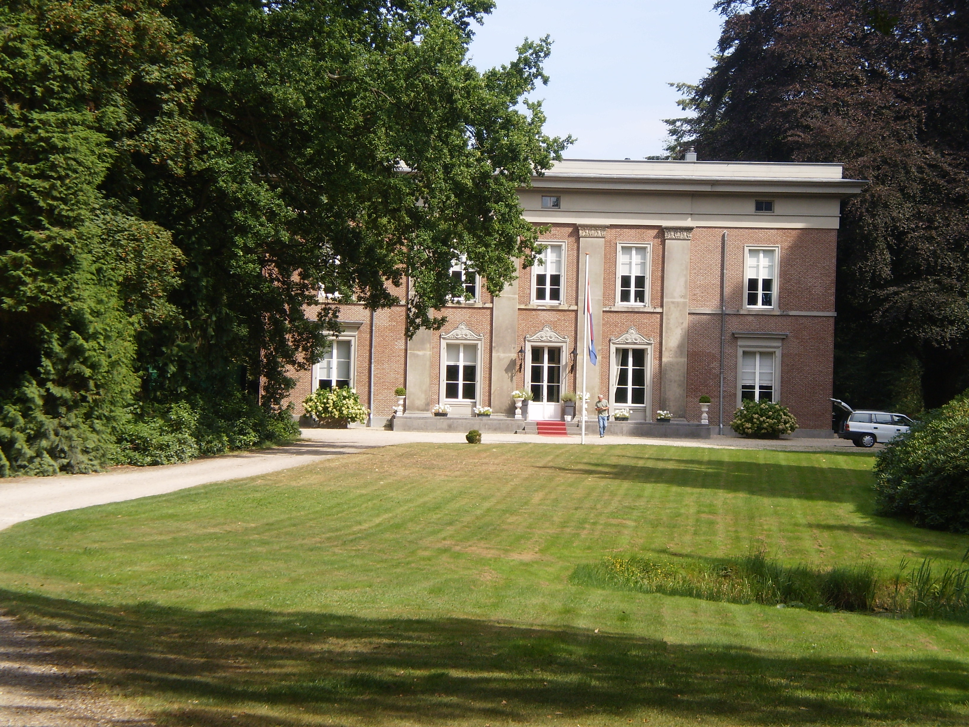 Eikenrode yn Ald-Loasdrecht.